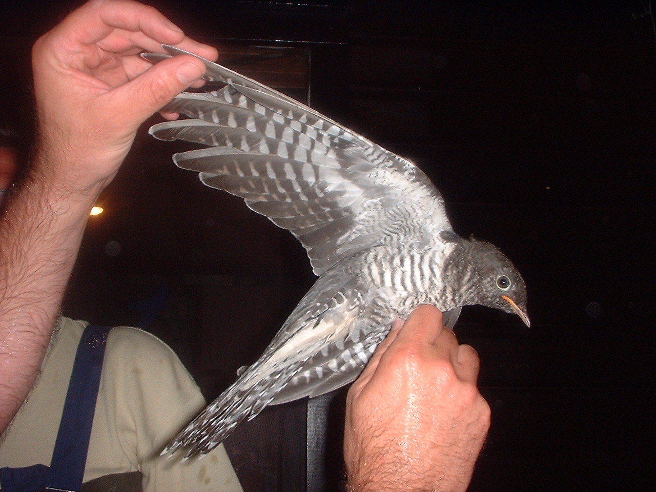 Maennlicher Kuckuck (in der Hand)